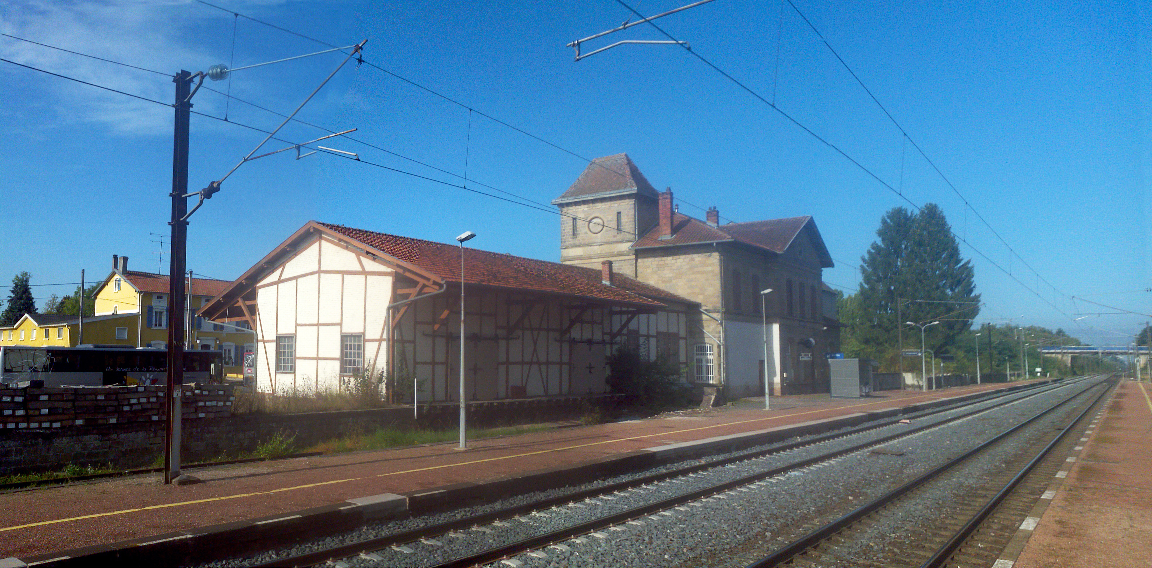 Bahnhof Morhange Gleisseite